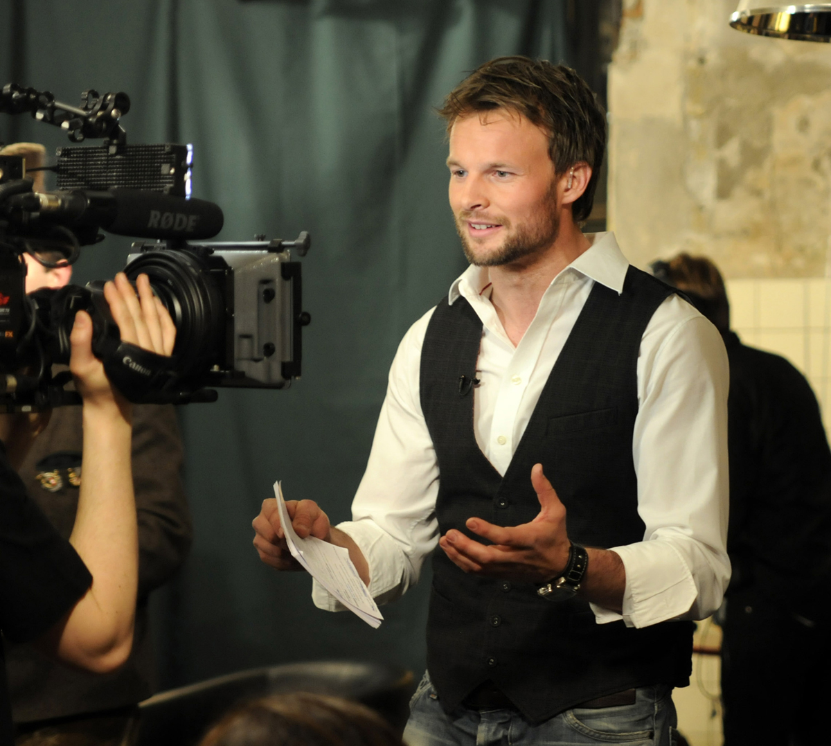 Florian Rudig moderiert TV-Livesendung, Österreich.